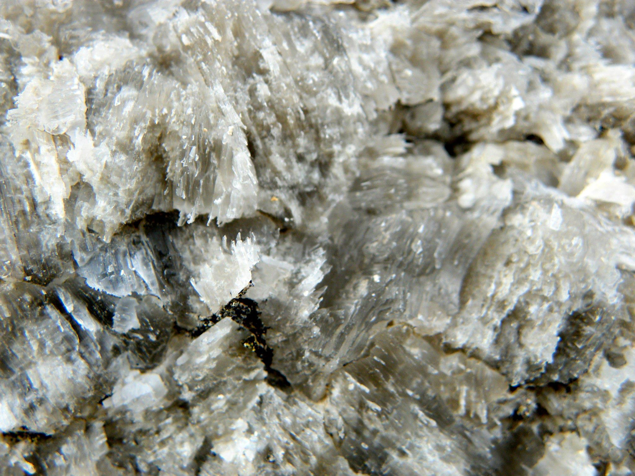 La superficie muraria di un'antica casa di Gessopalena.